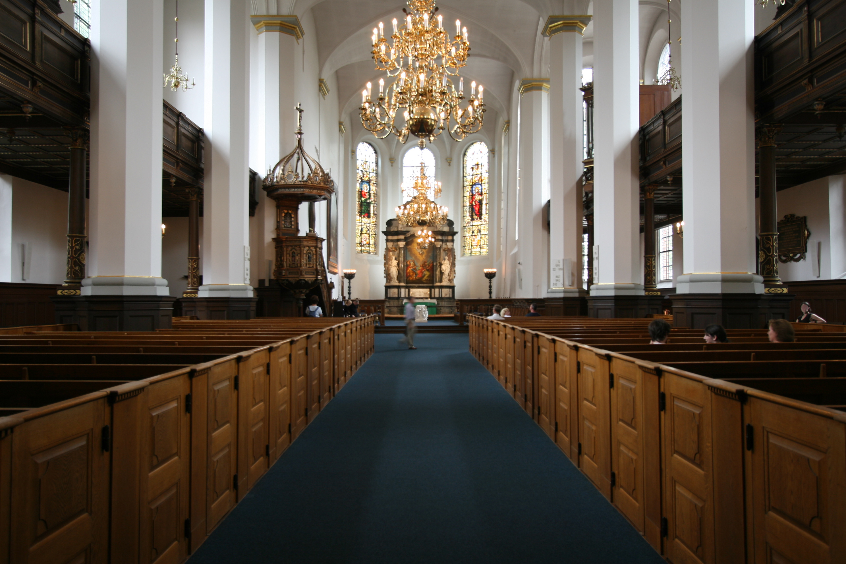 Helligåndskirken, Copenhagen, Denmark. Interior.